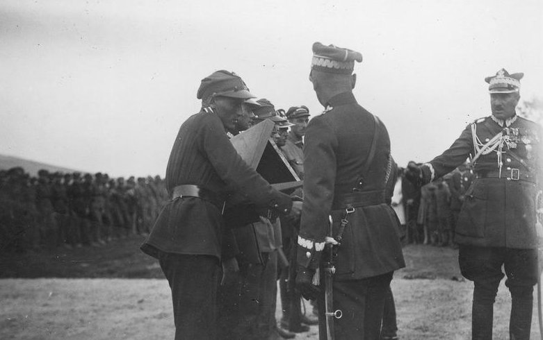 Gen. Edward Rydz-Śmigły wręcza nagrody uczestnikom marszu swojego imienia (Brzeżany, 1928). Po prawej: gen. Stanisław Sołłohub-Dowoyno.